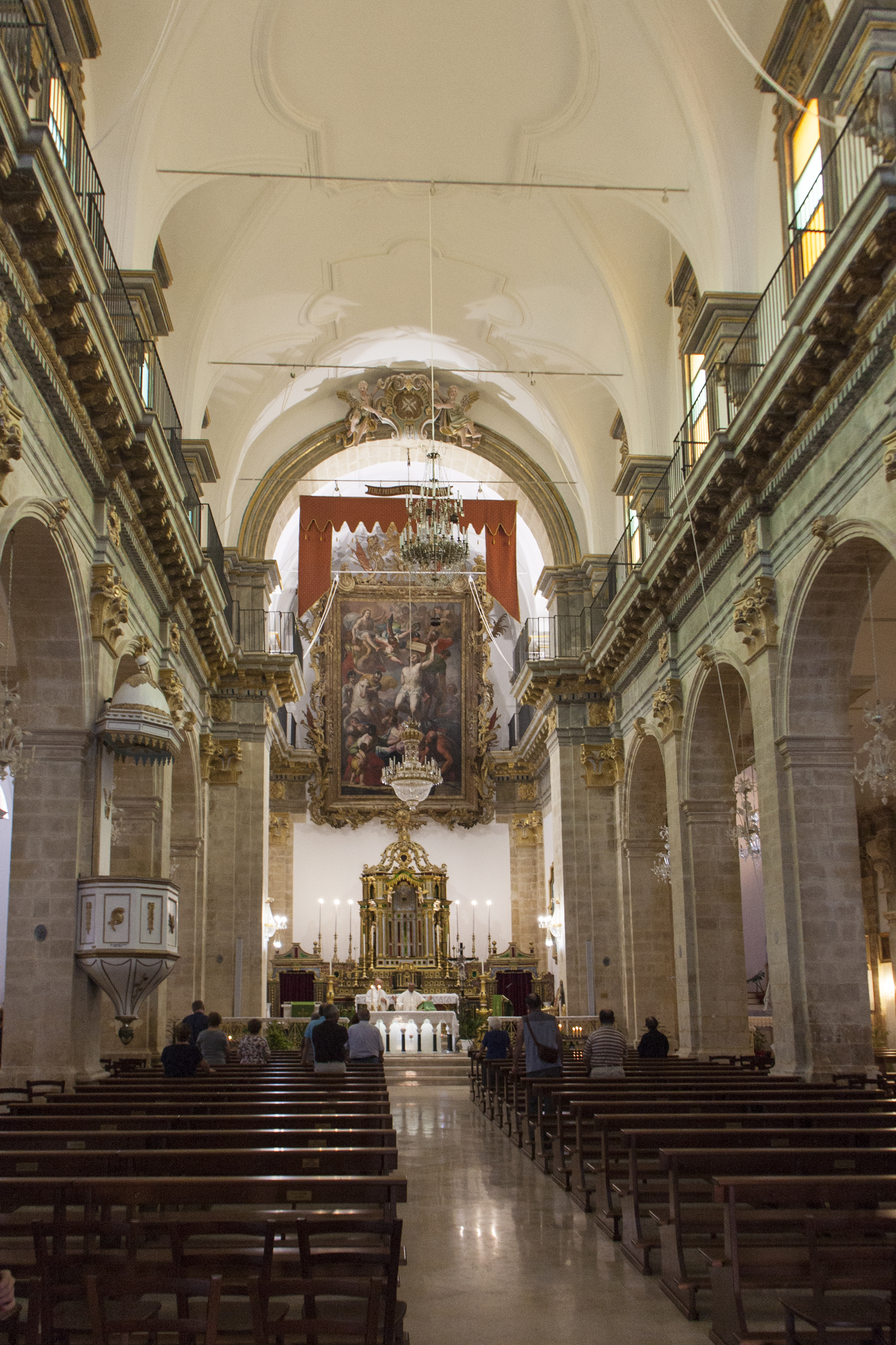 interno